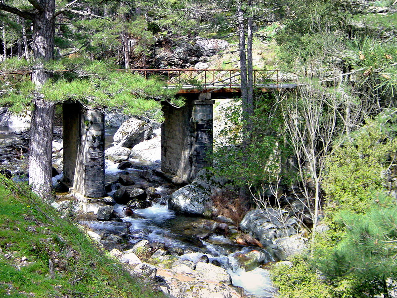 Mausoléo (Corsica) - Rivière Melaja